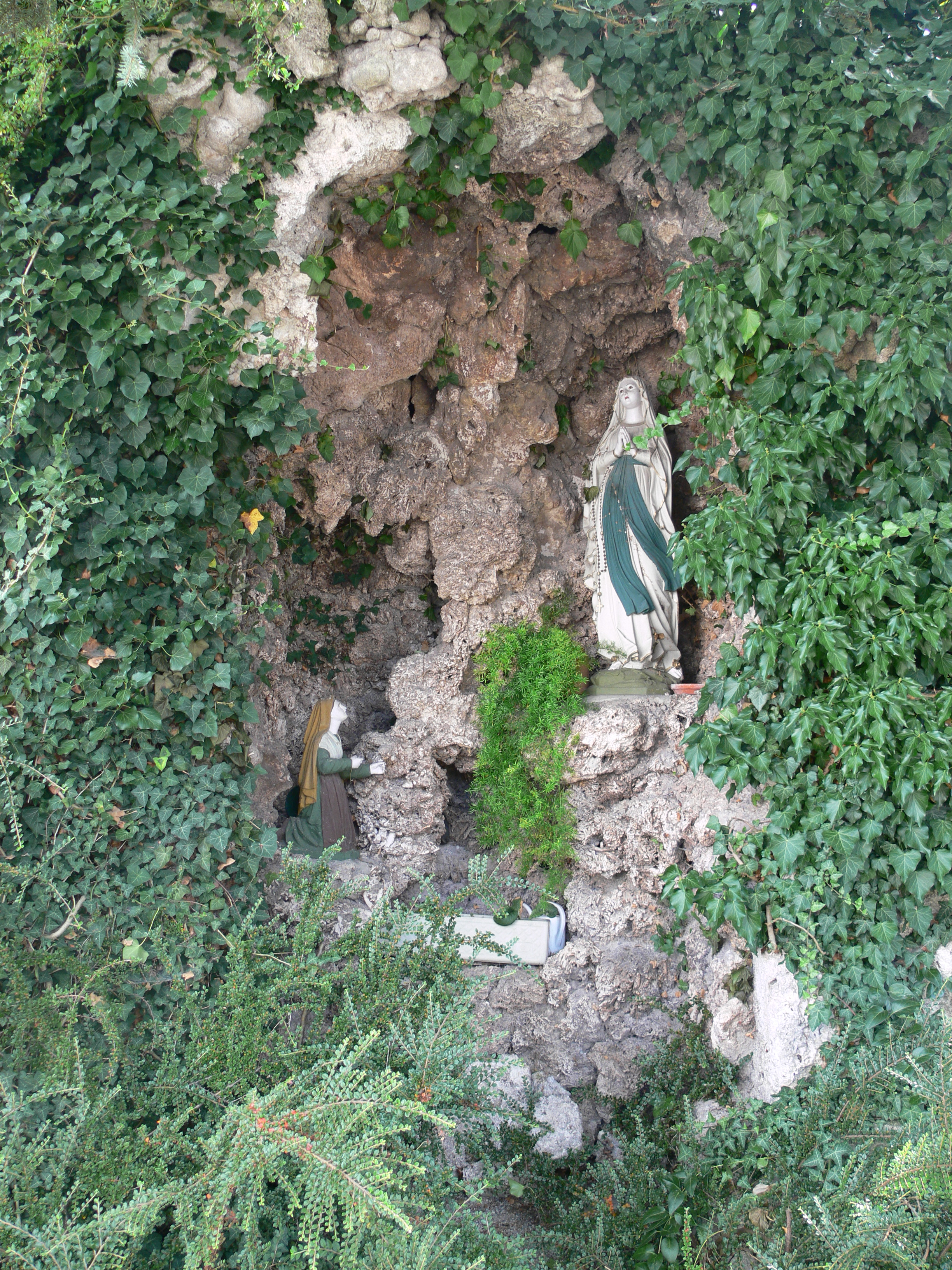 Katholische Pfarrkirche St. Walburga und St. Ottilia, Gornhofen, Ortschaft Eschach, Stadt Ravensburg Lourdesgrotte auf dem Friedhof